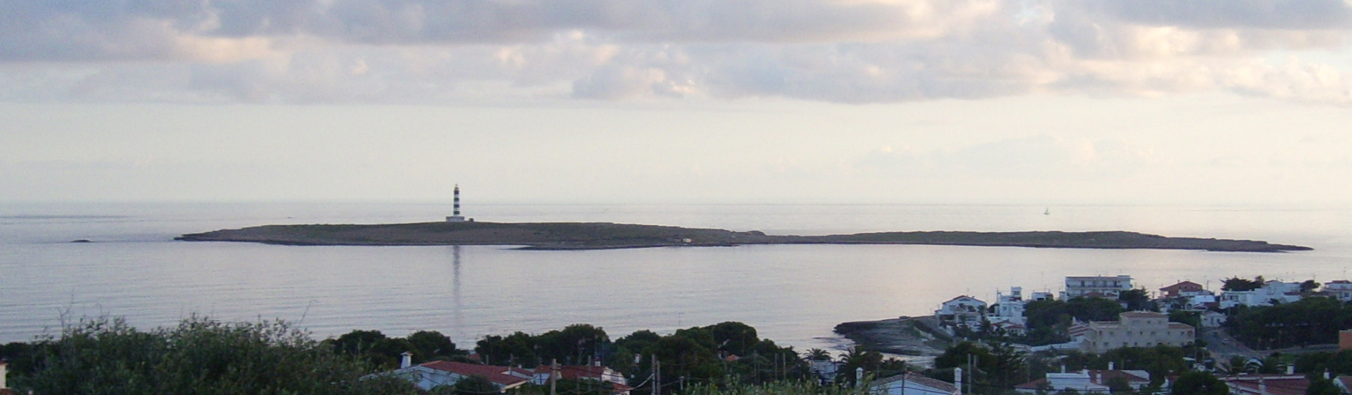 Illa de l'aire, Menorca.